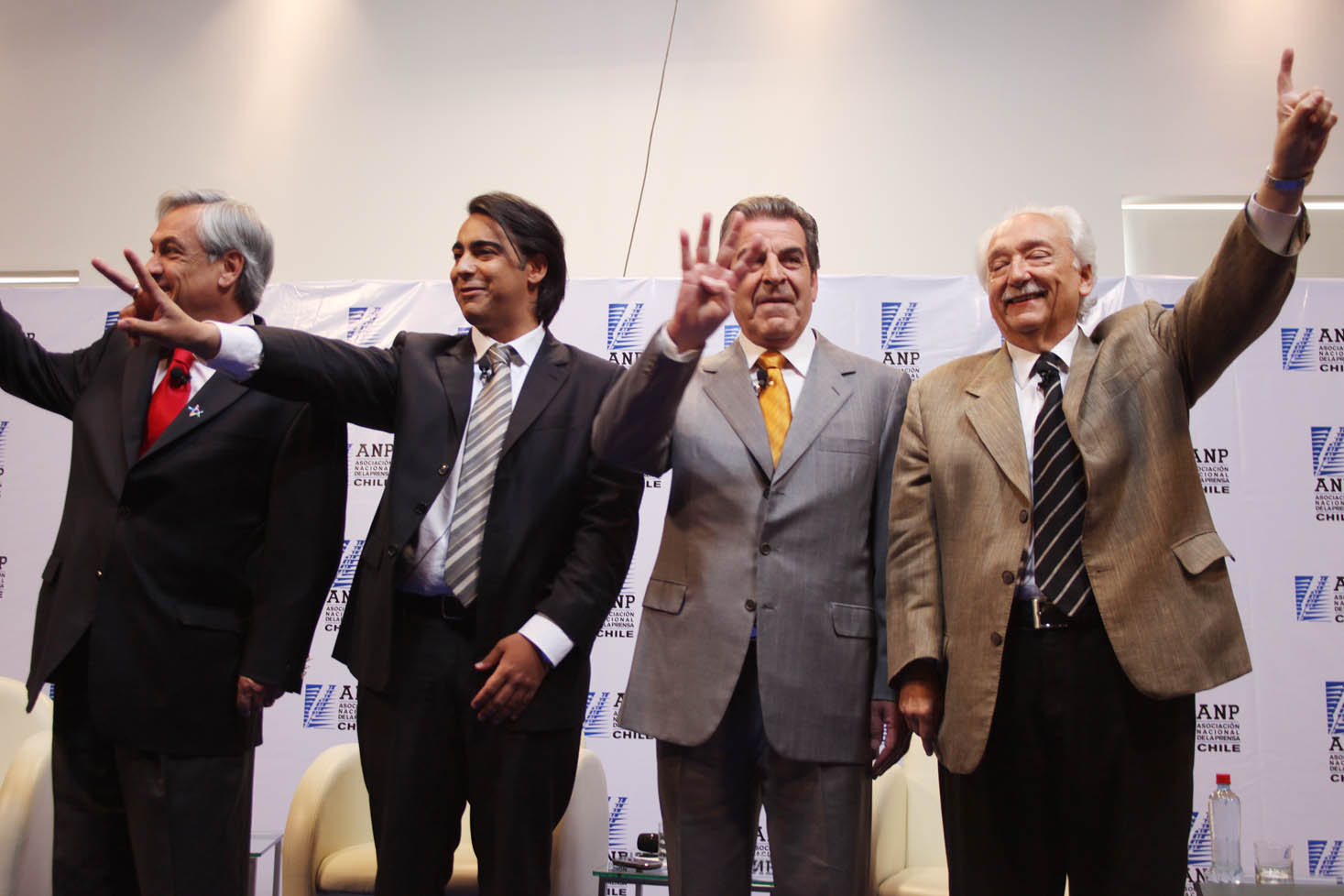 Candidatos a las elecciones presidenciales de 2009 en Chile en el debate realizado por la Asociación Nacional de Prensa, en Talca, el 6 de noviembre de 2009. De izquierda a derecha, Sebastián Piñera, Marco Enríquez-Ominami, Eduardo Frei y Jorge Arrate.